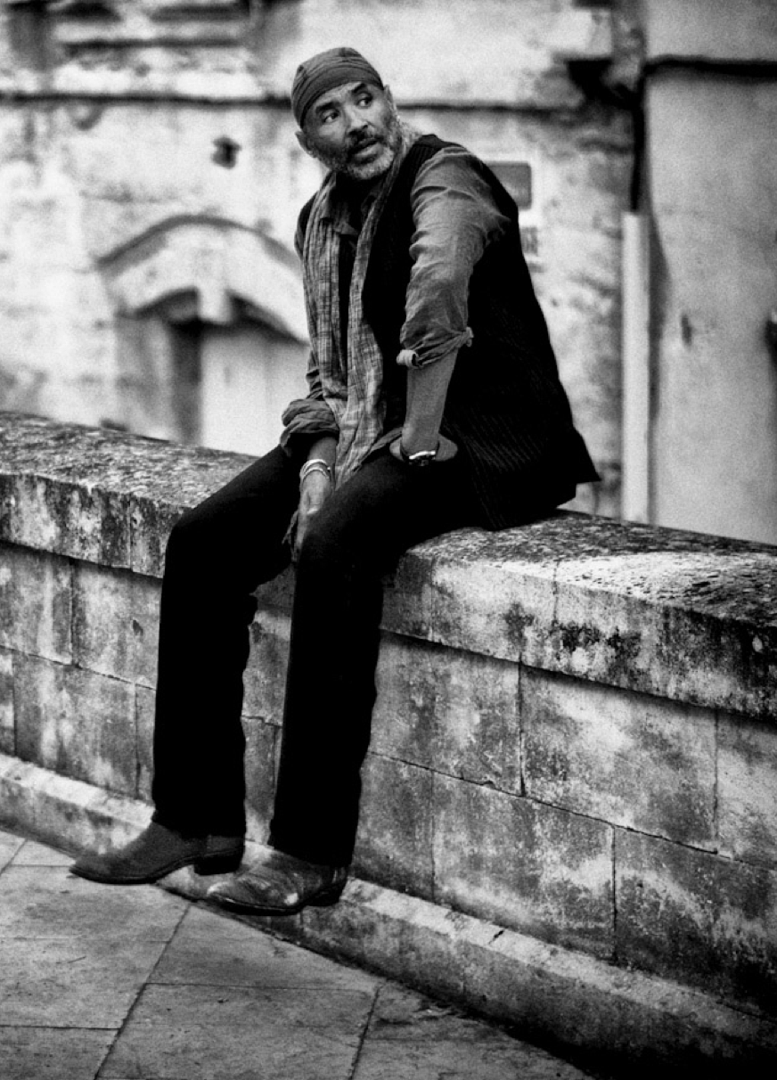 Stanley Greene during a workshop in Uzès, France, July 2008